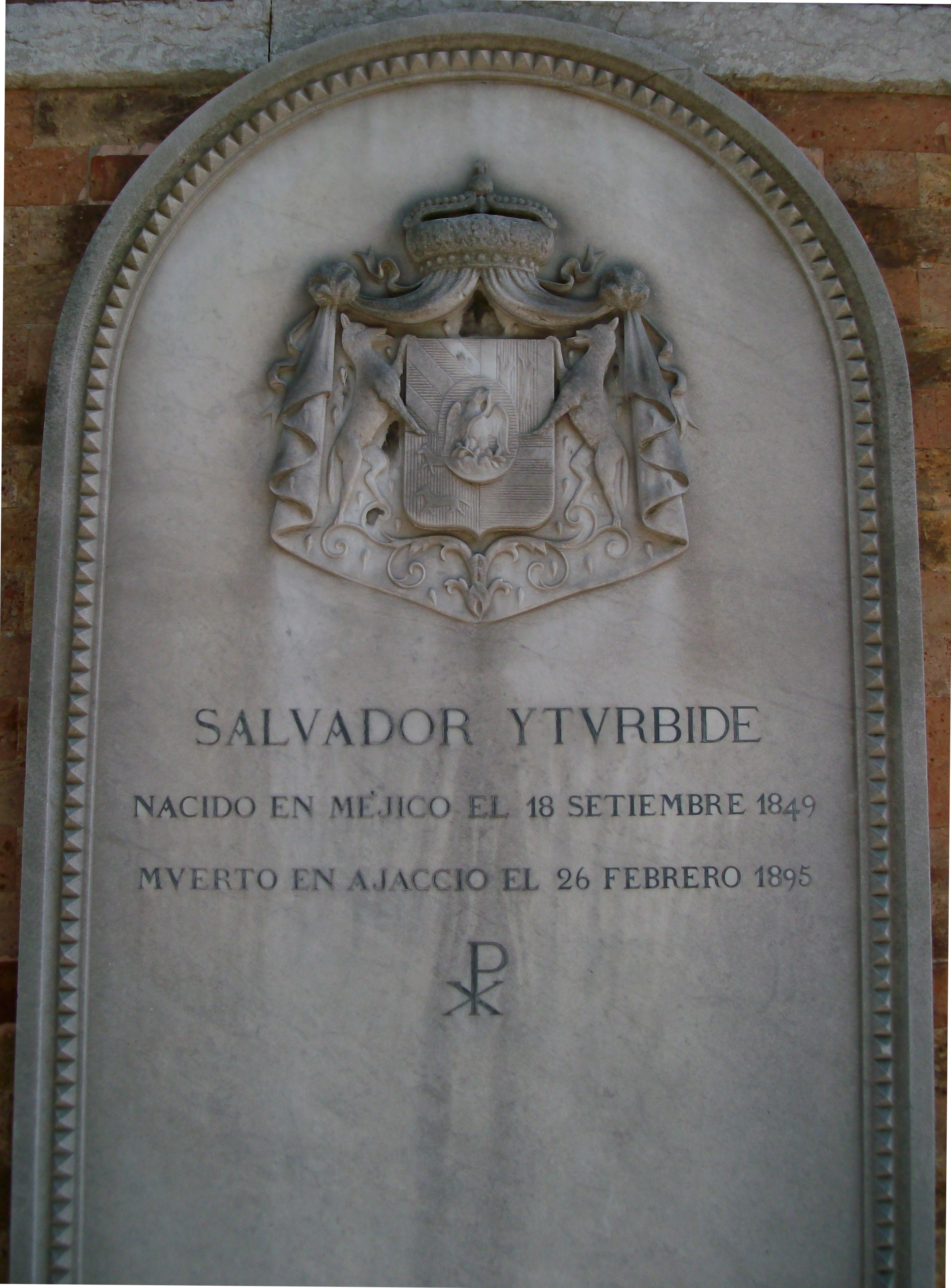 Memory to Salvador de Itúrbide y Marzán On the stone is mentioned "Salvador Yturbide, nacido en Mejico el 18 Setiembre 1849, muerto en Ajaccio 26 Febreri 1895. The photo was taken in Venice, Italy."